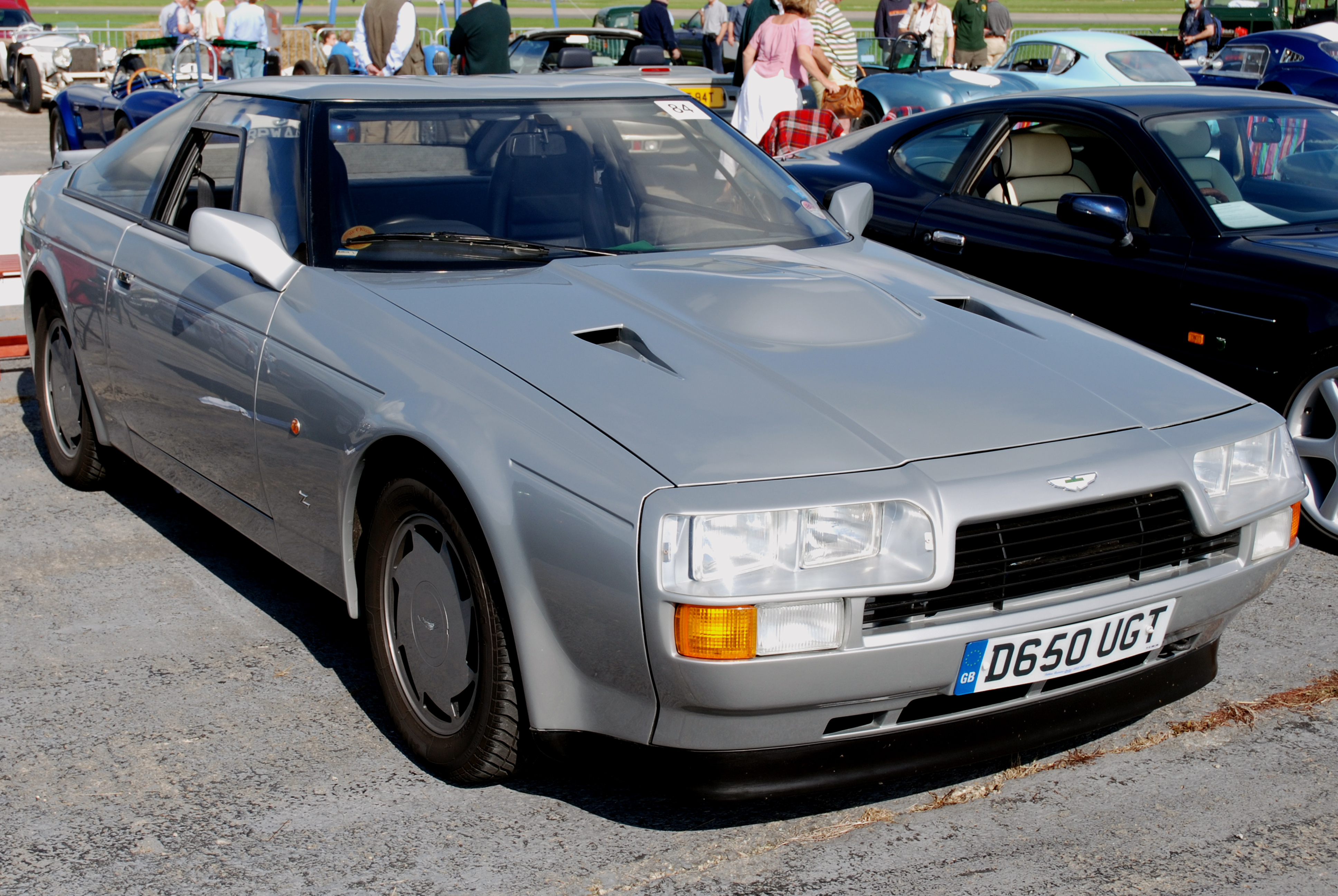 @ Dunsfold Wheels and Wings 2007